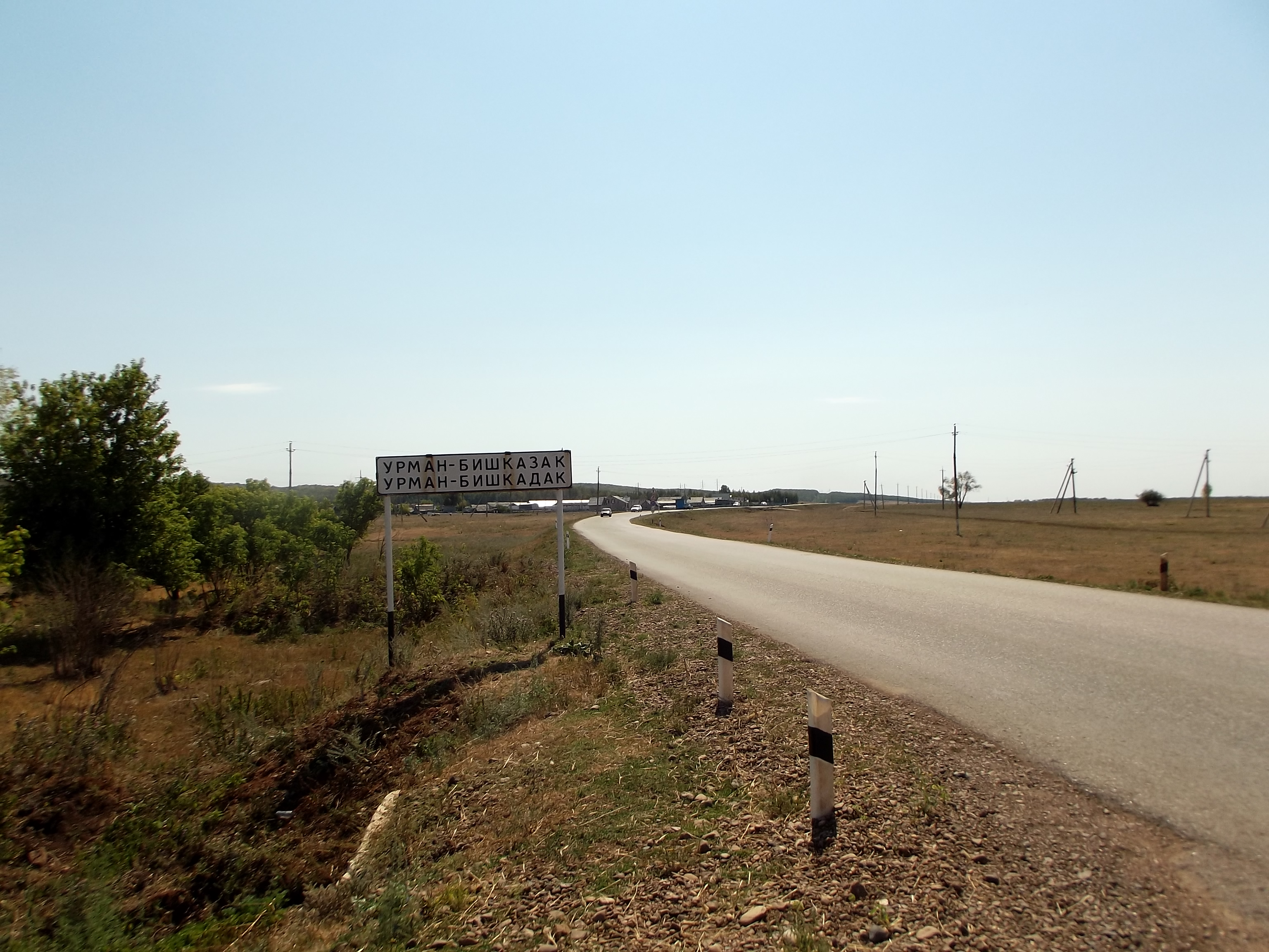 Road sign Urman-Bishkadak (village in Ishimbai rayon)